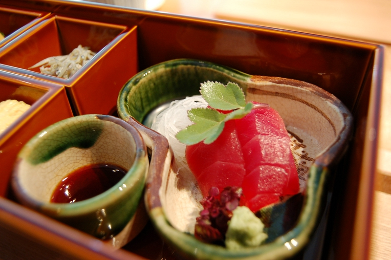 Сасими.